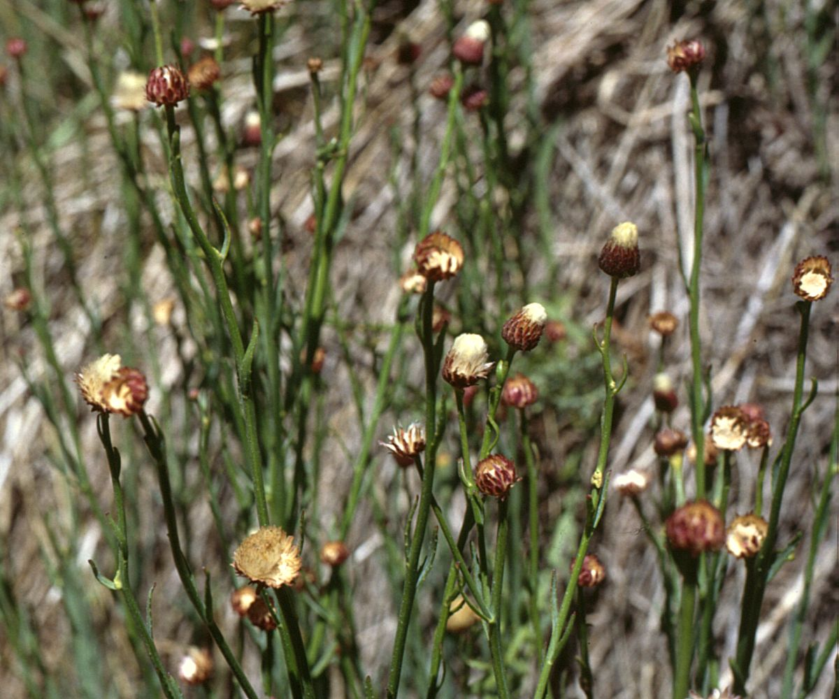 Baccharis juncea, Korbblütler (Asteraceae) - Argentinien/Argentina, Paso de Uspallata, Puente del Inca, ca. 2700 m s.m. (Prov. Mendoza)